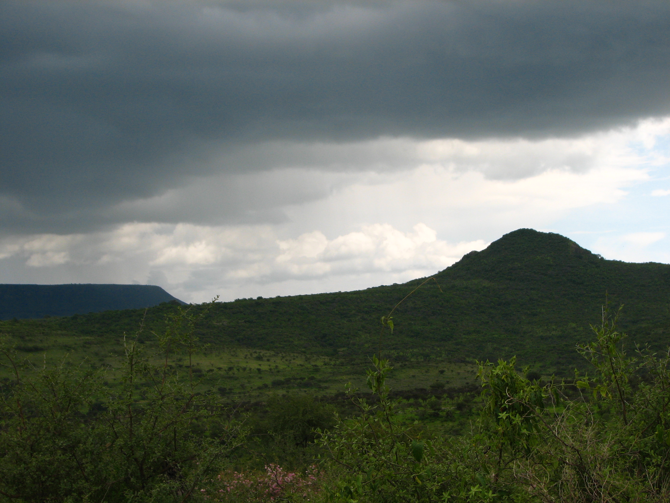 Cerro Cuate en primer plano, al fondo se ve la Mesa de González